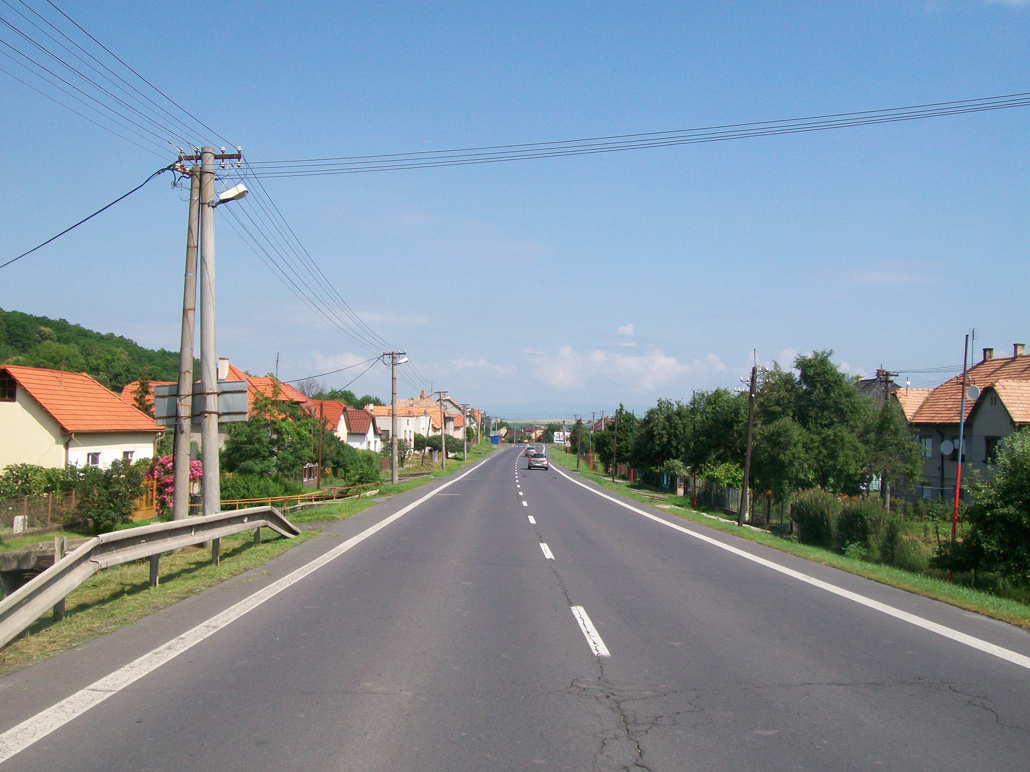 Pohľad na obec Kurtáň